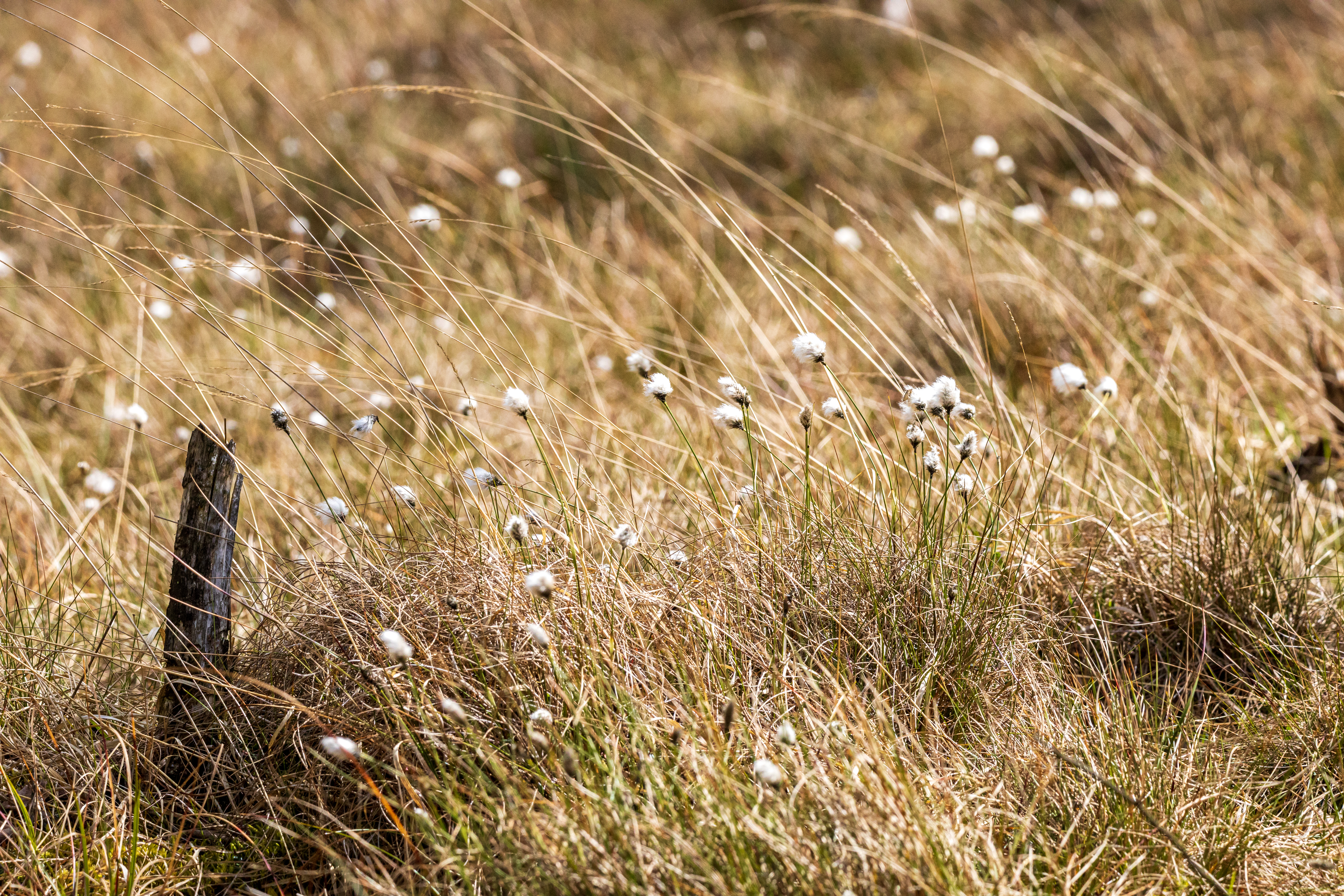 Scheiden-Wollgras im FFH-Gebiet Naturwald Stodthagen und angrenzende Hochmoore